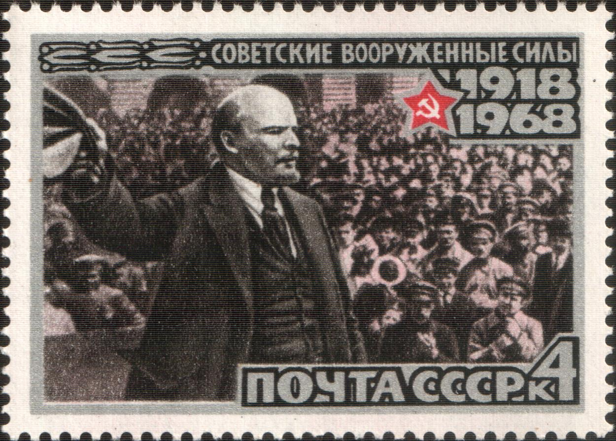 Почтовая марка СССР - 50 лет Вооруженных Сил СССР